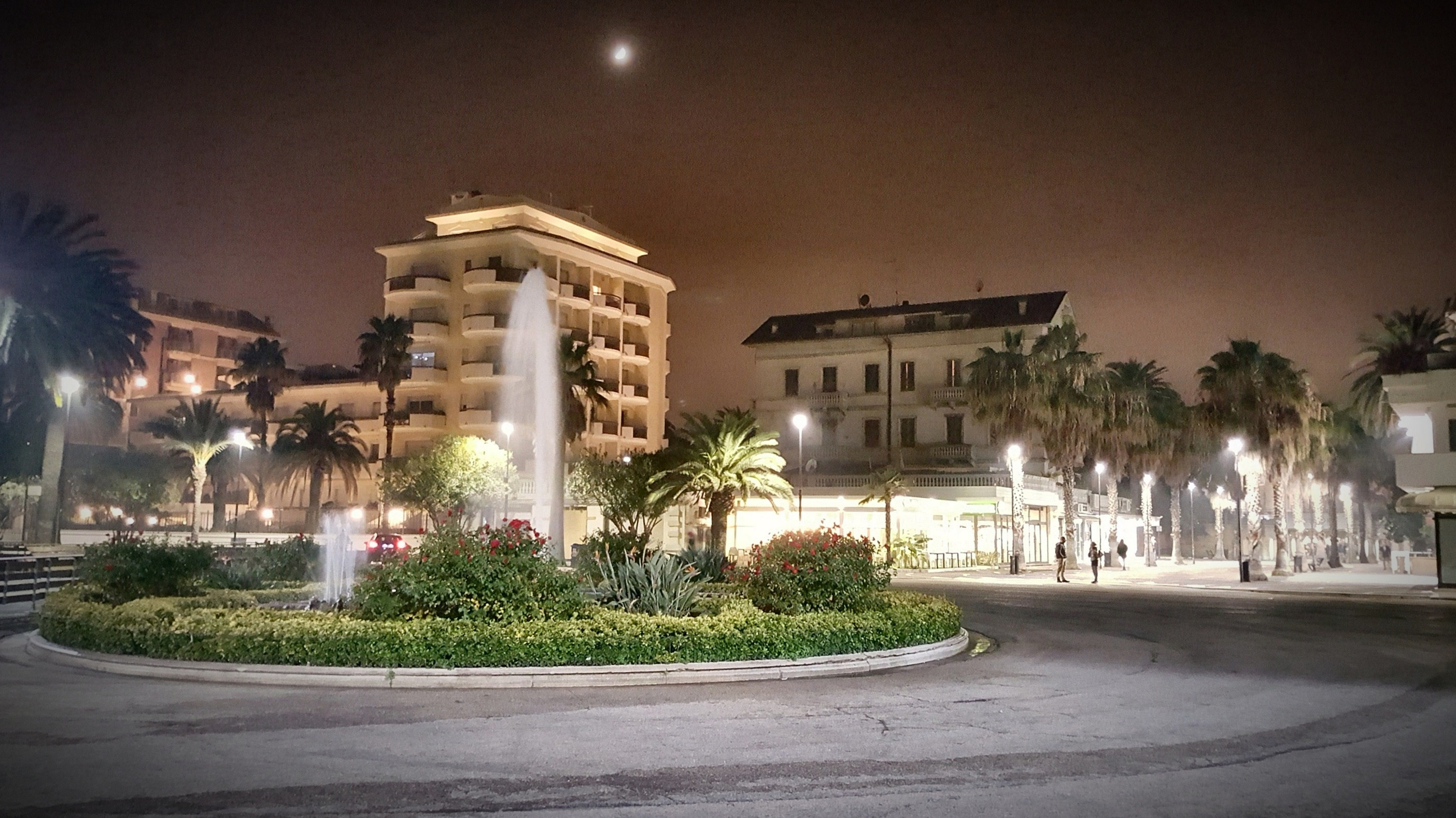 Piazza Giorgini in notturna